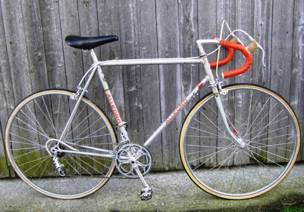 Allegro-Fahrrad aus den 1970er Jahren